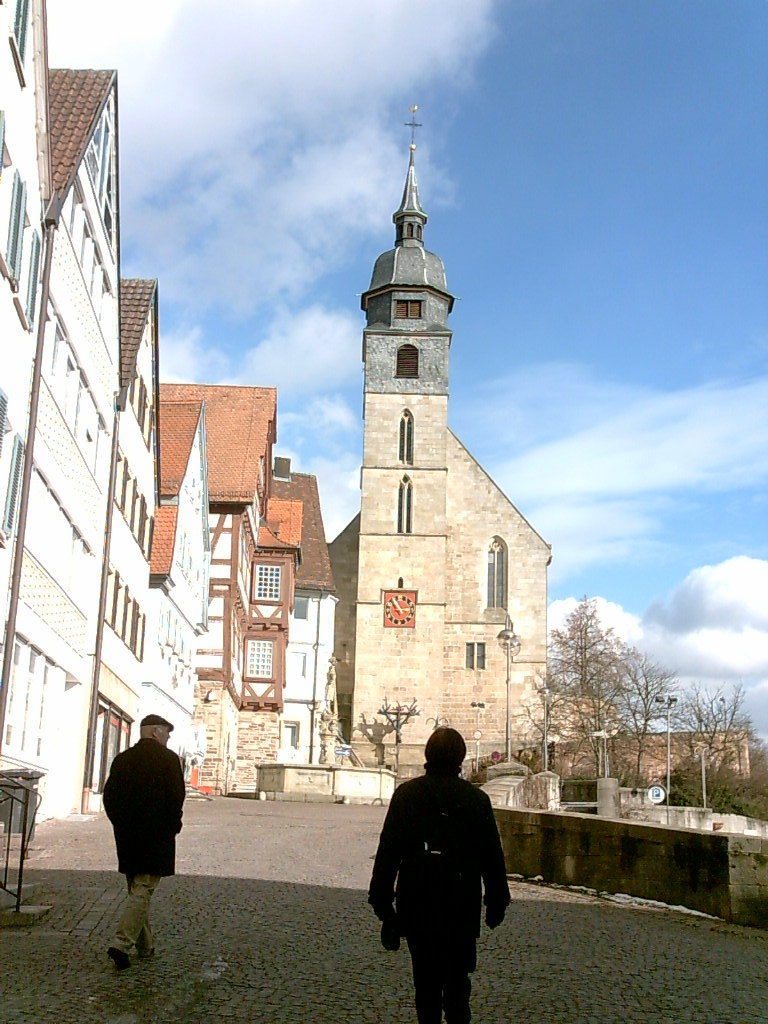 Blick vom Marktplatz auf die Stadtkirche Böblingen, selbst fotografiert, März 2006